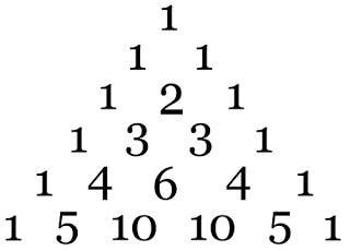 Pascaltriangle